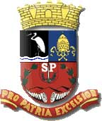 Brasão de Armas do município paulista de Garça, Brasil.